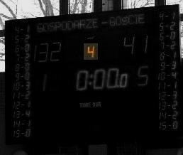 Tablica wyników z wyróżnionym numerem kwarty